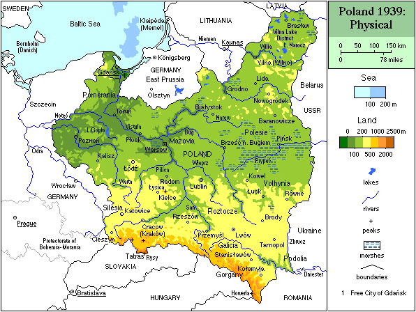 Poland, physical 1939/Mapa fizyczna Polski 1939